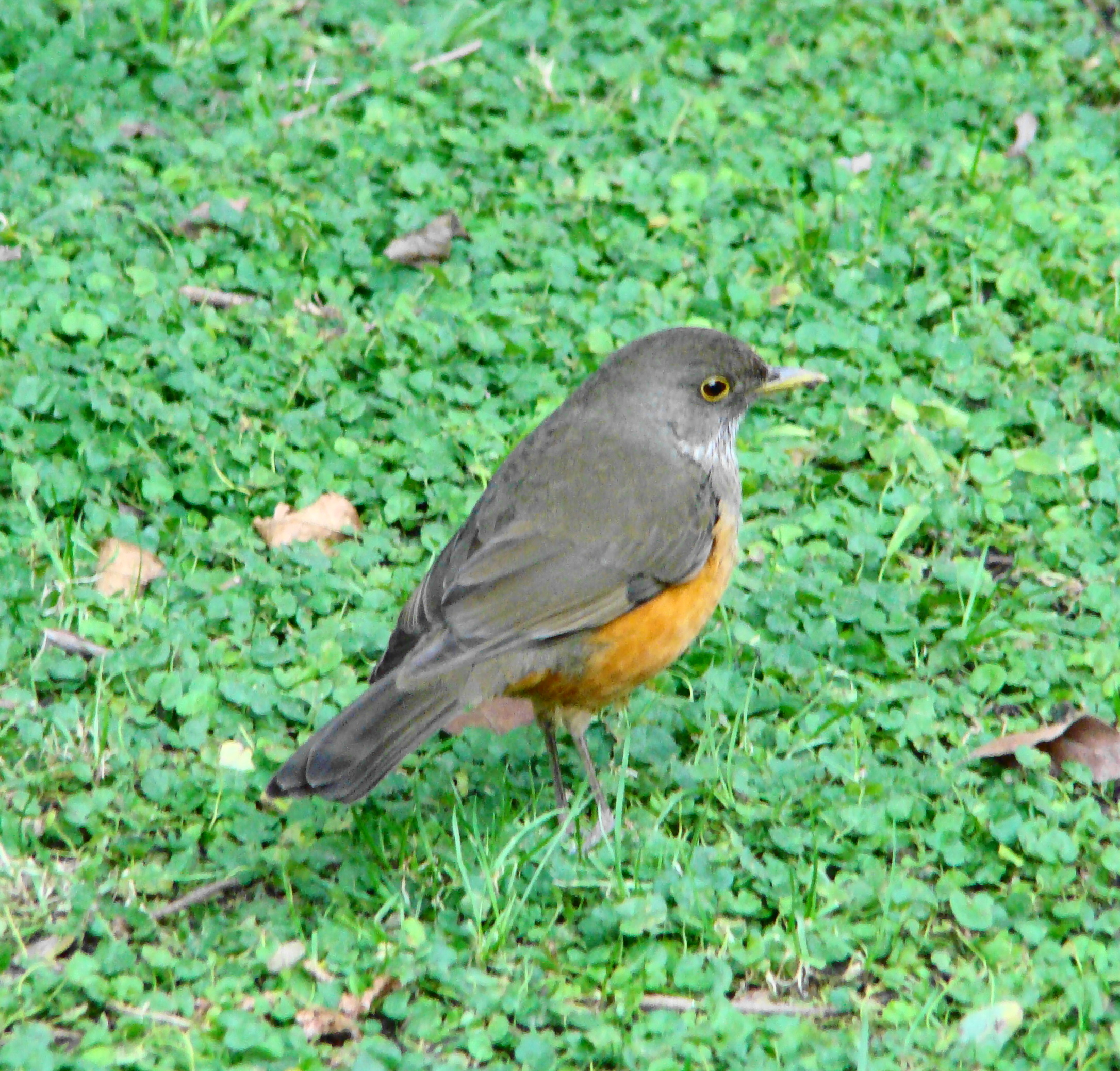 Zorzal colorado